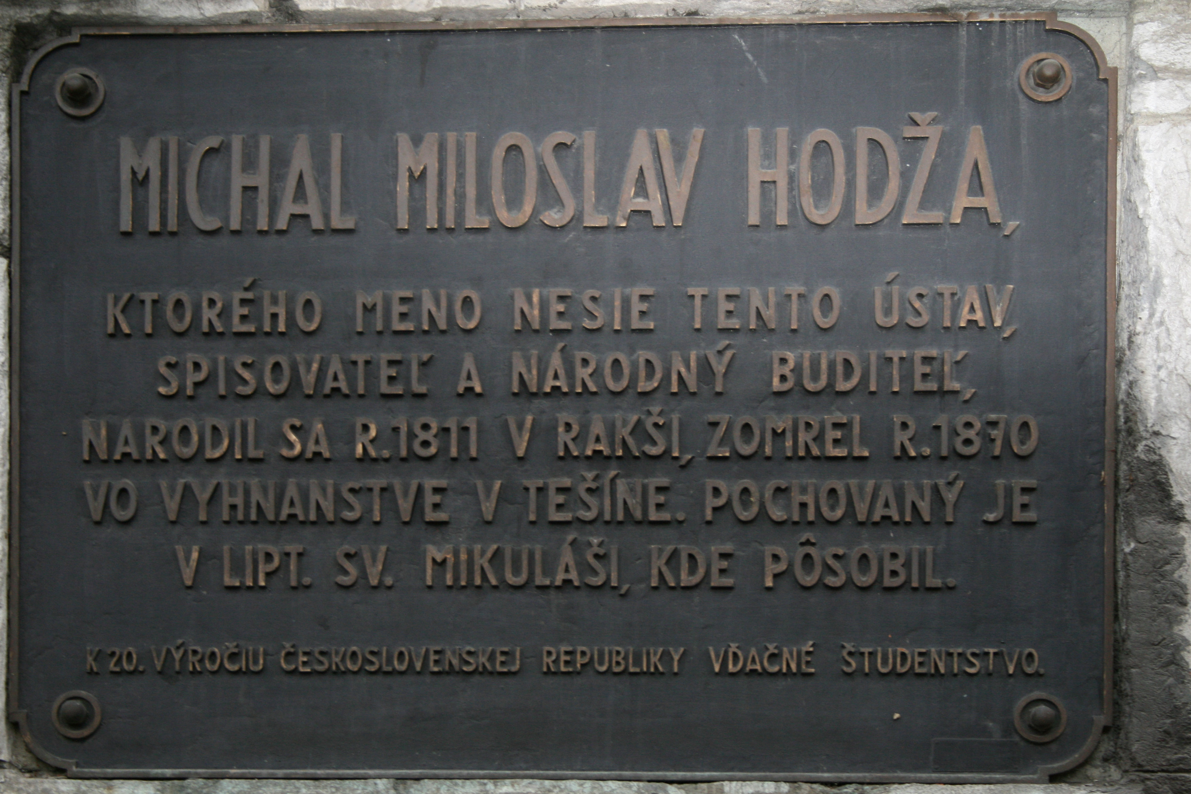 Tabuľa M. M. Hodžu v Liptovskom Mikuláši